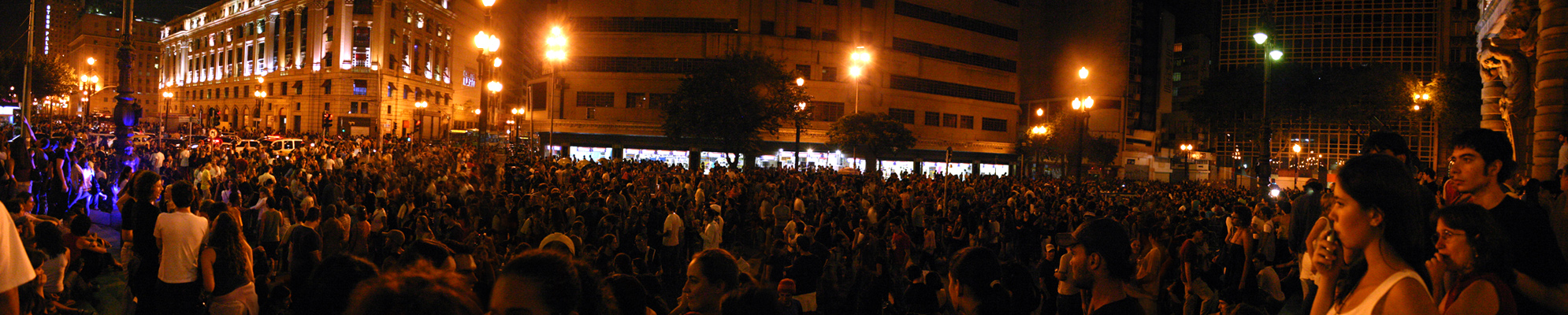 virada cultural